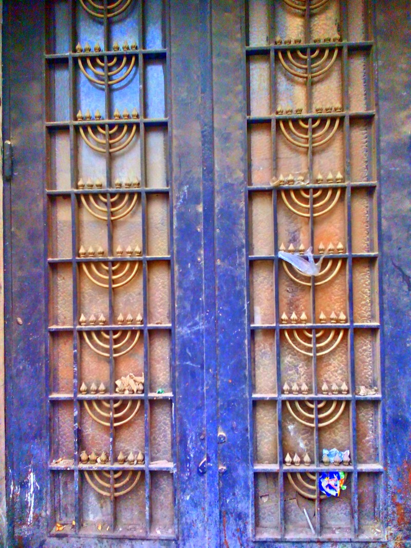 Tunis, Tunisie تونس العاصمة ، تونس